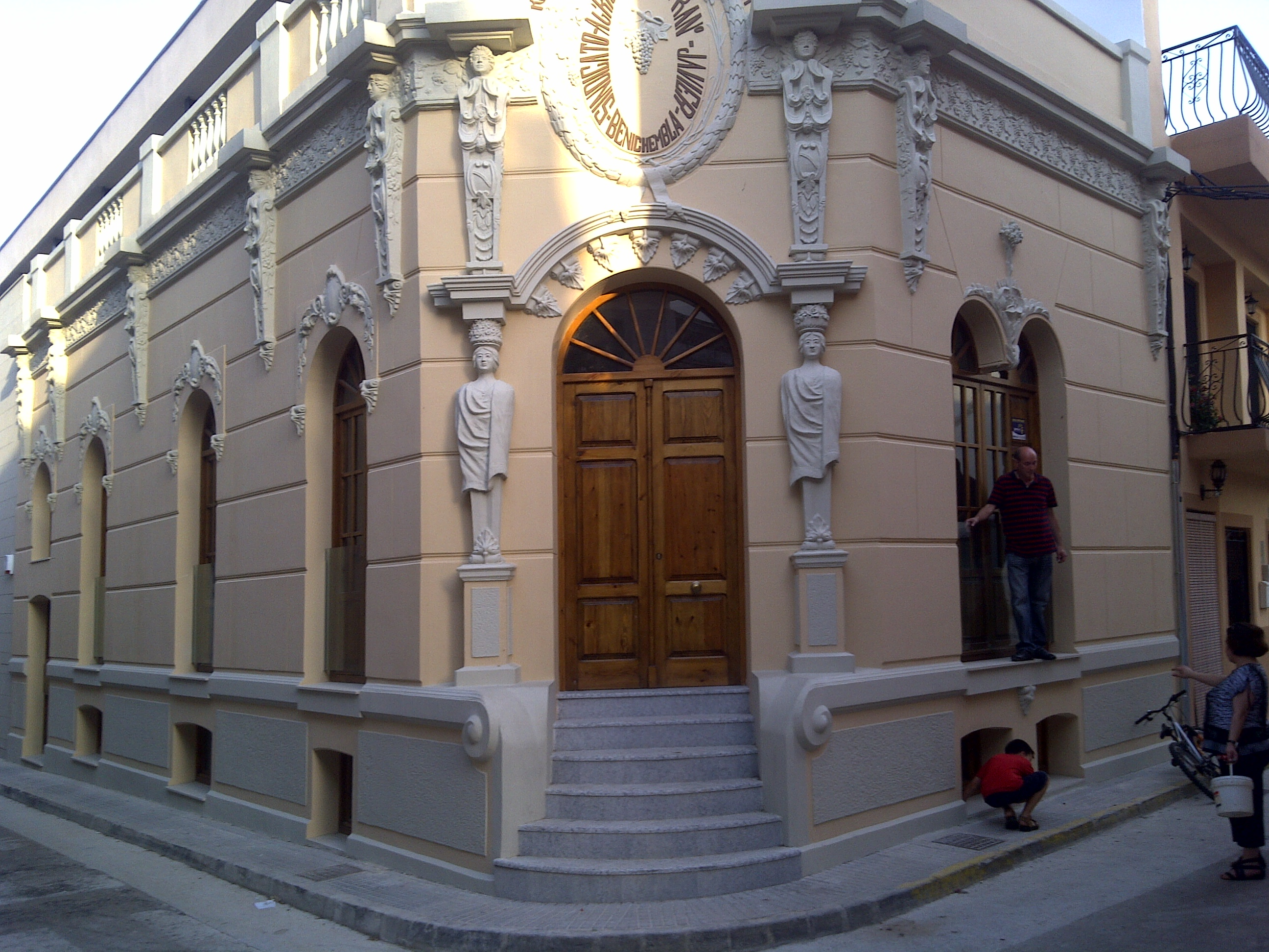 Recentment restaurat en l´any 2011